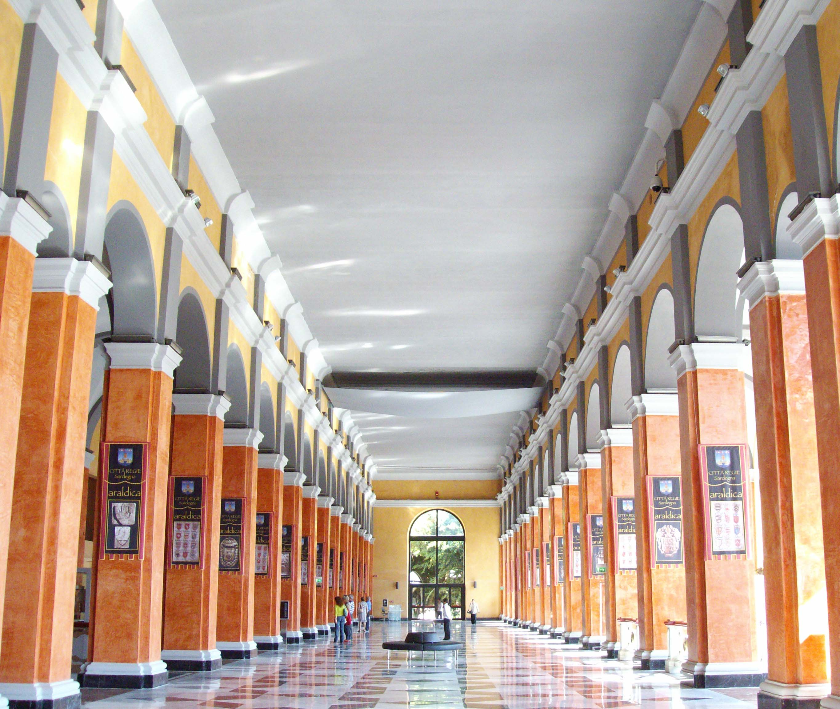 Passeggiata coperta del bastione di Saint Remy - Cagliari